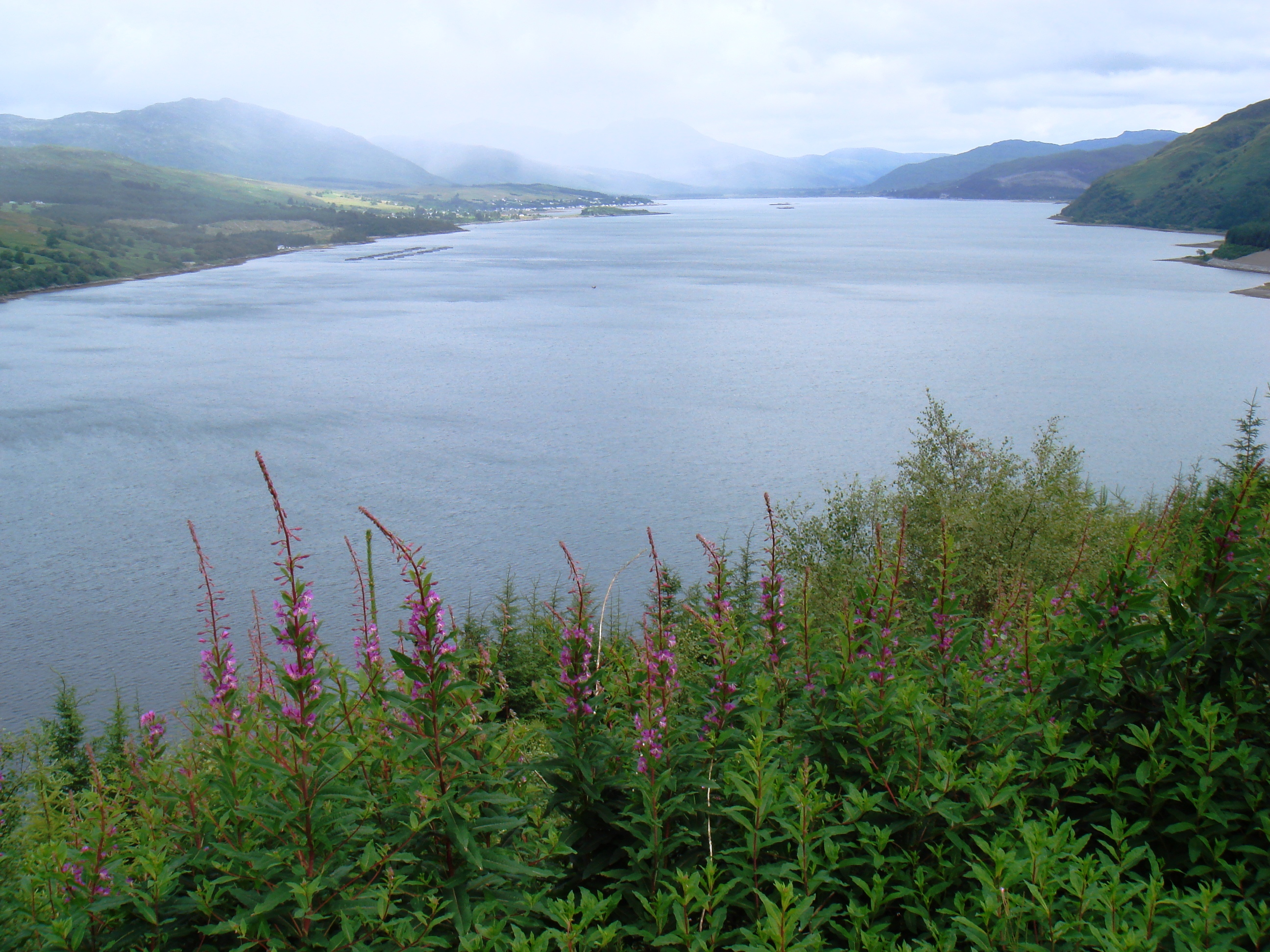 Loch Carron (Escocia)